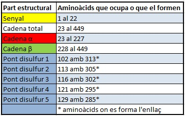 Parts estructurals de la clusterina i corresponents aminoàcids